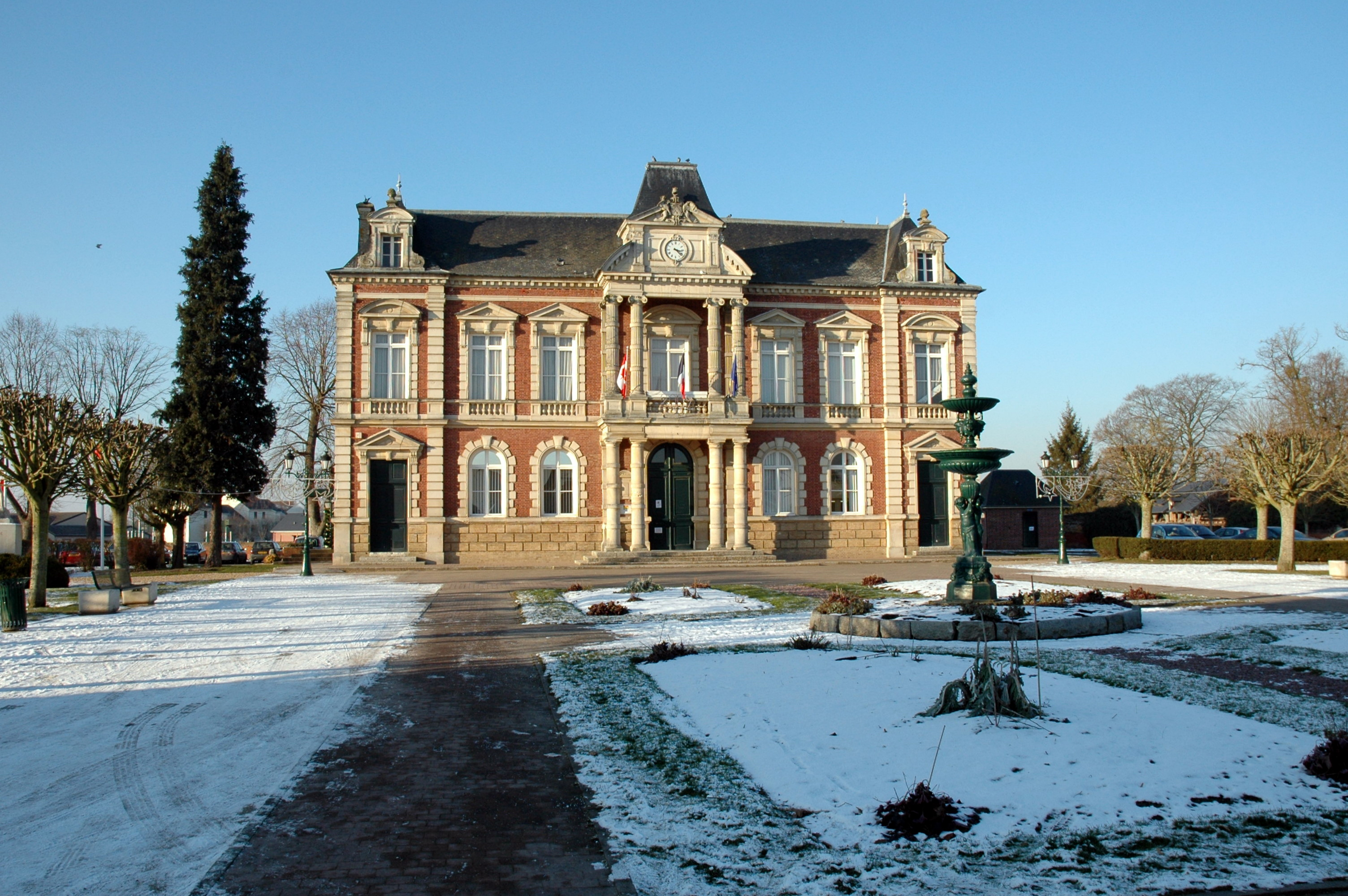 Bourgtheroulde-Infreville (Eure, France). La mairie.